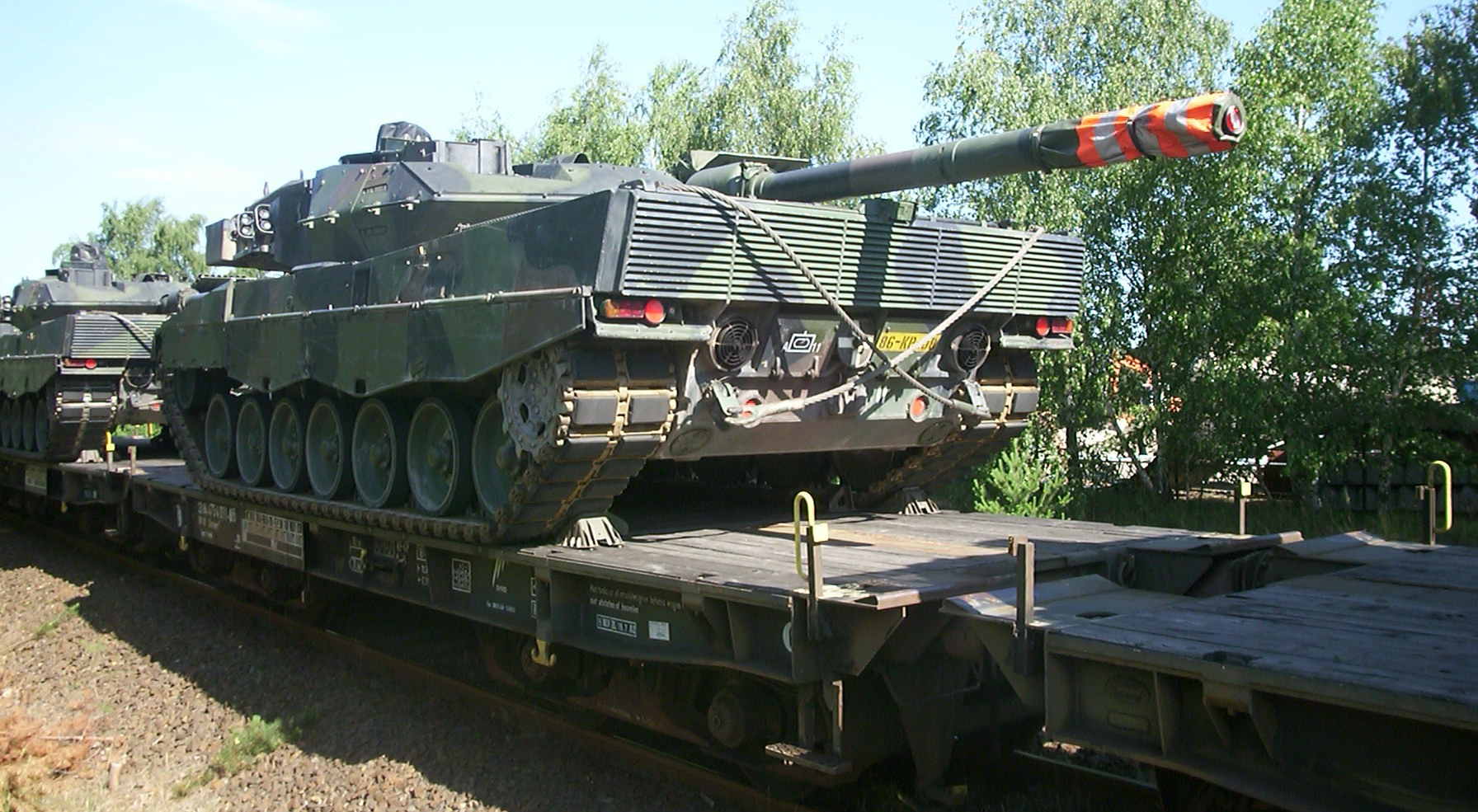 Transportzug mit Panzern Leopard 2A6 des Niederländischen Heeres auf dem Weg zum Truppenübungsplatz Oberlausitz